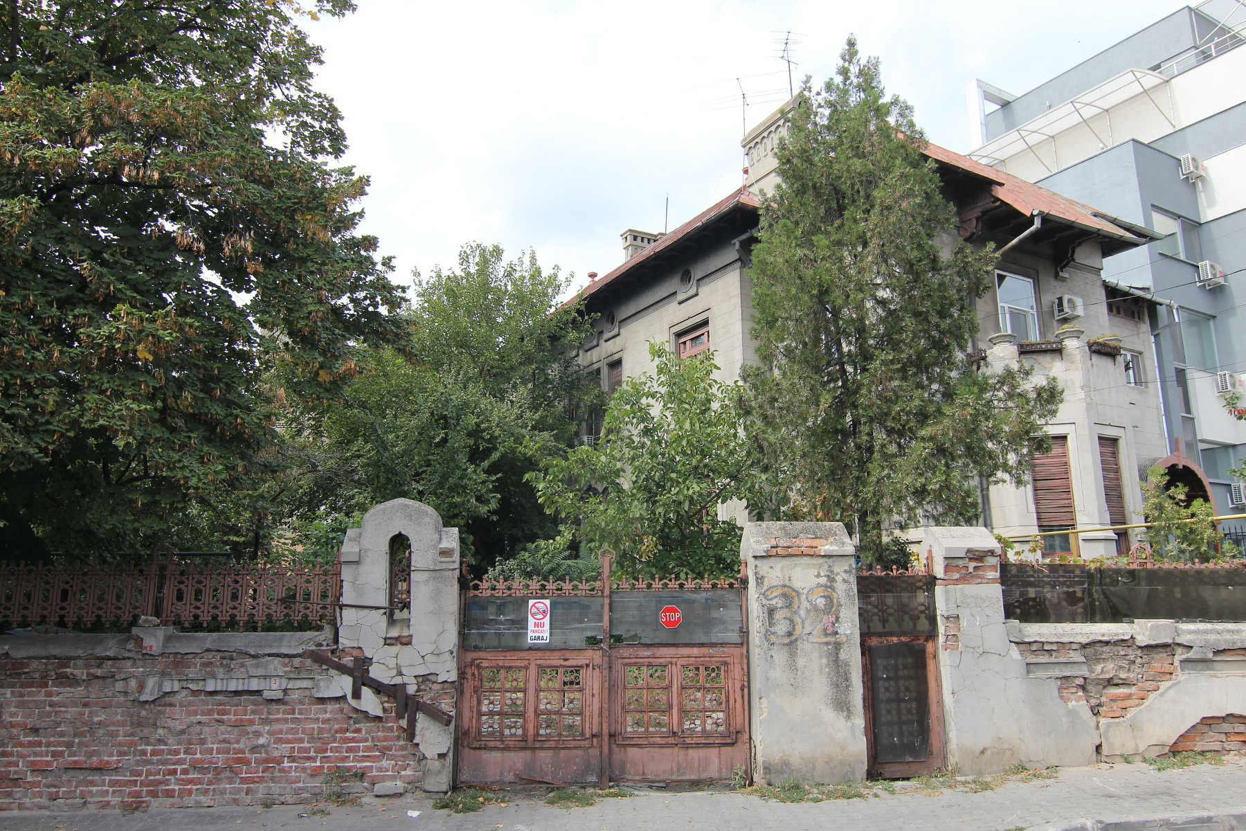 Casă pe Str Romulus